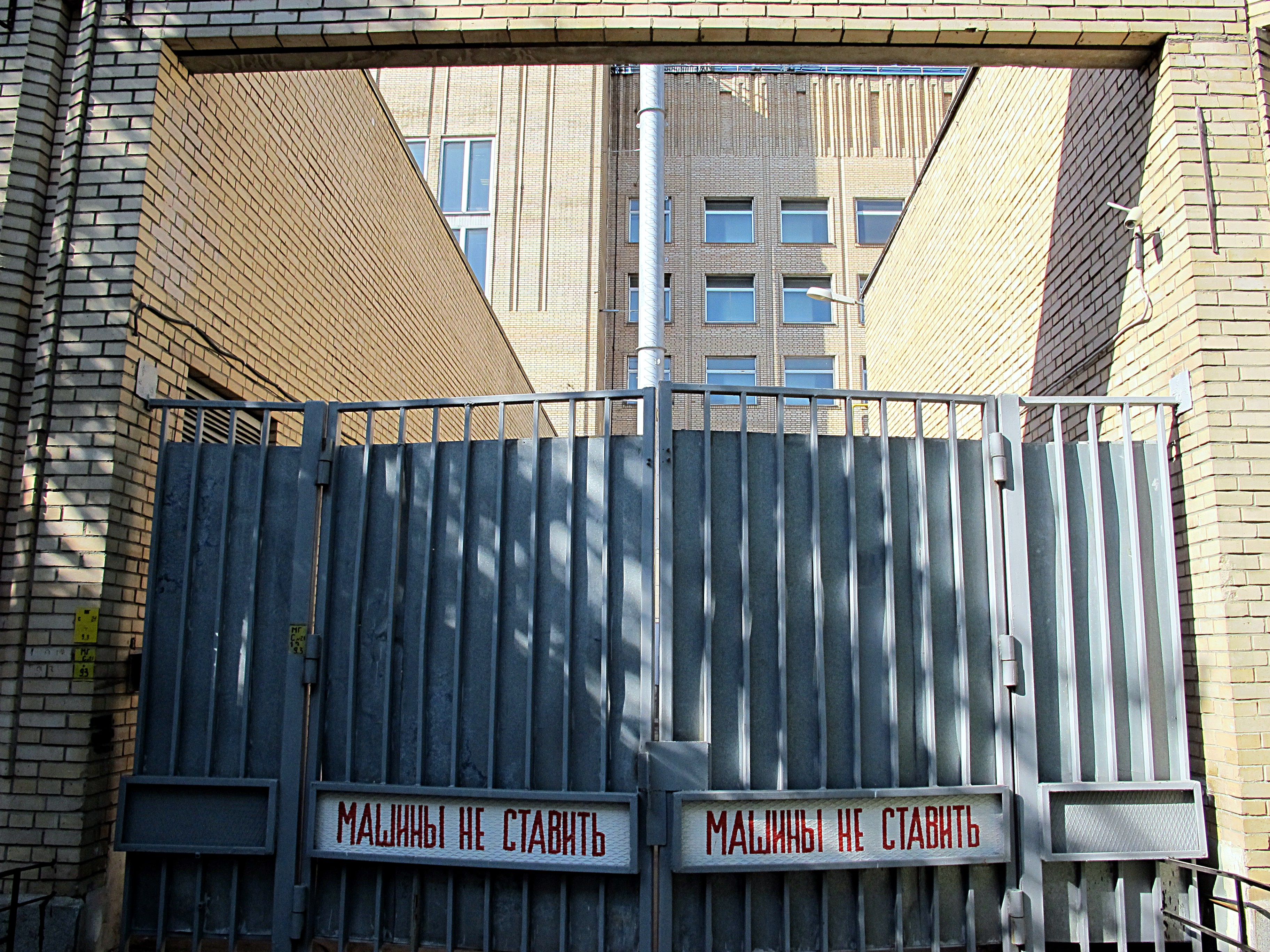 2011-05-12 Машины не ставить. Конструктивизм.